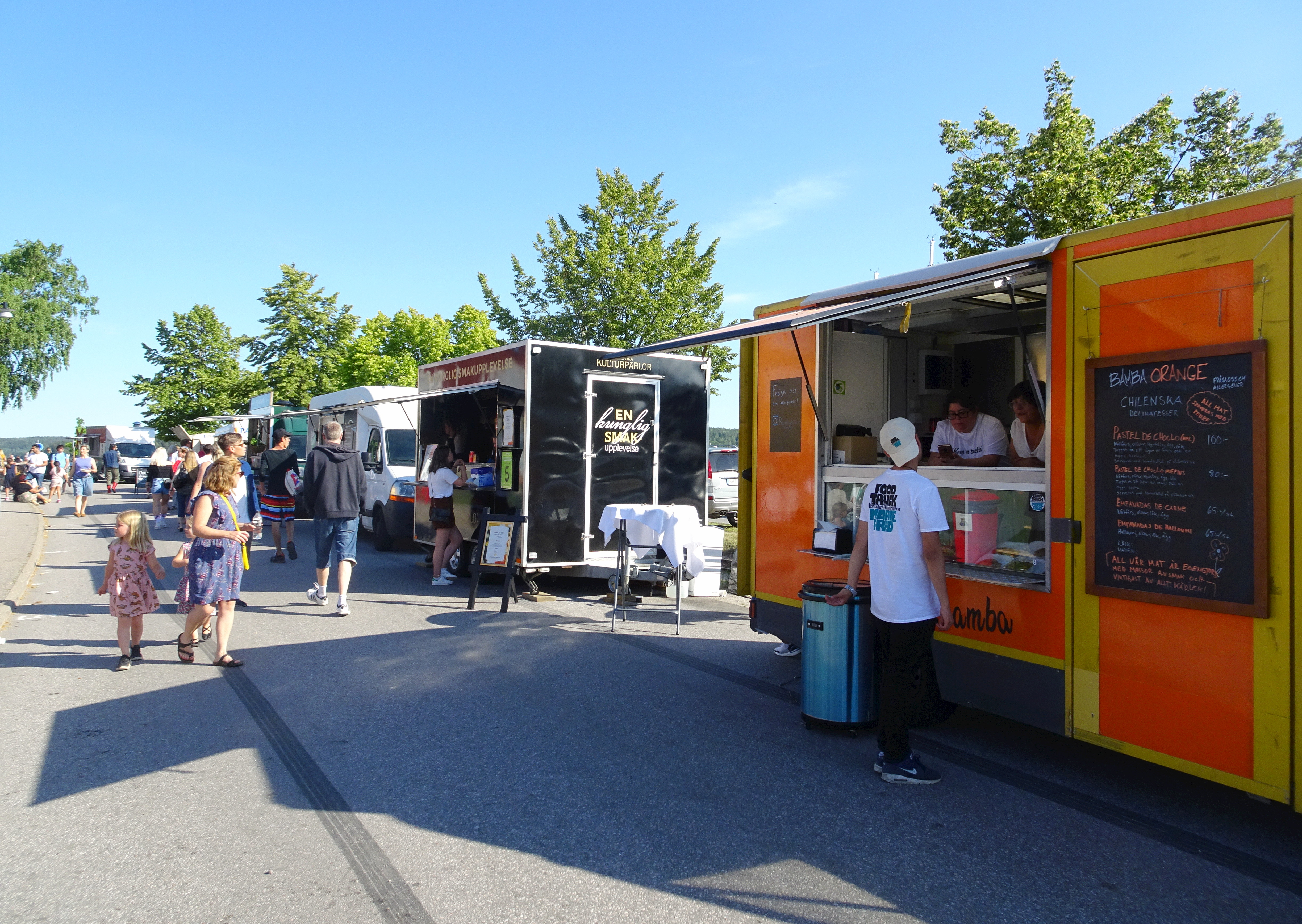 Mariefred, food-truck festival. Nordiska Mästerkapen i Food Truck.